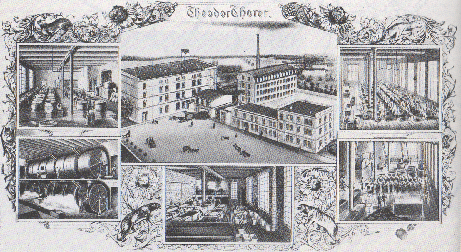 Pelz-Veredlungsbetrieb des Rauchwarenhandelshauses Theodor Thorer in Leipzig-Lindenau im Jahr 1893.